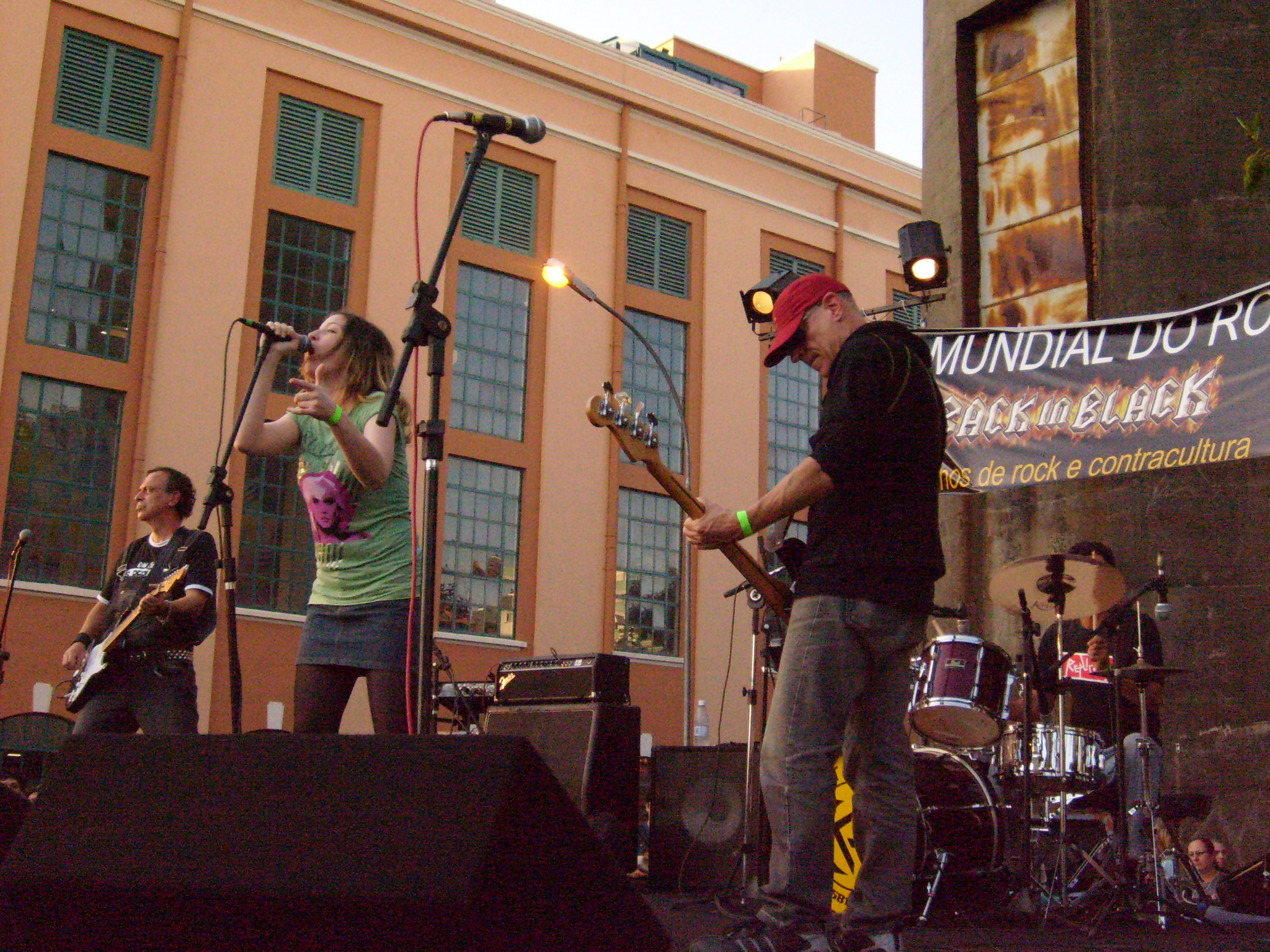 Os Replicantes no domingo, 13 de julho na Usina do Gasômetro.